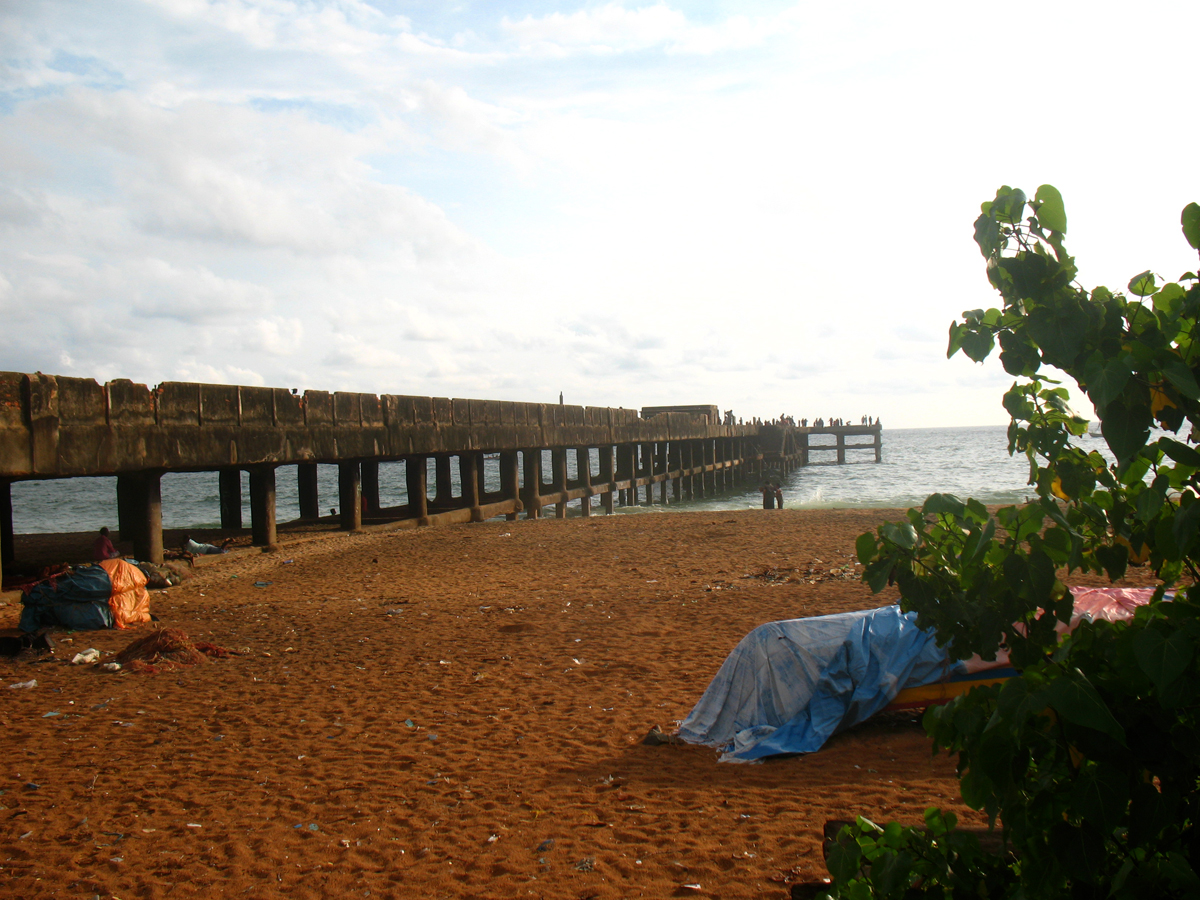 LENGTH : 703 FEET WIDTH OF GANGWAY : 24 FEET R.C.C. PILES : 127 Nos. cEMENT USED : 571 TONS STEEL USED : 250 TONS TOTAL COST 10,10,000